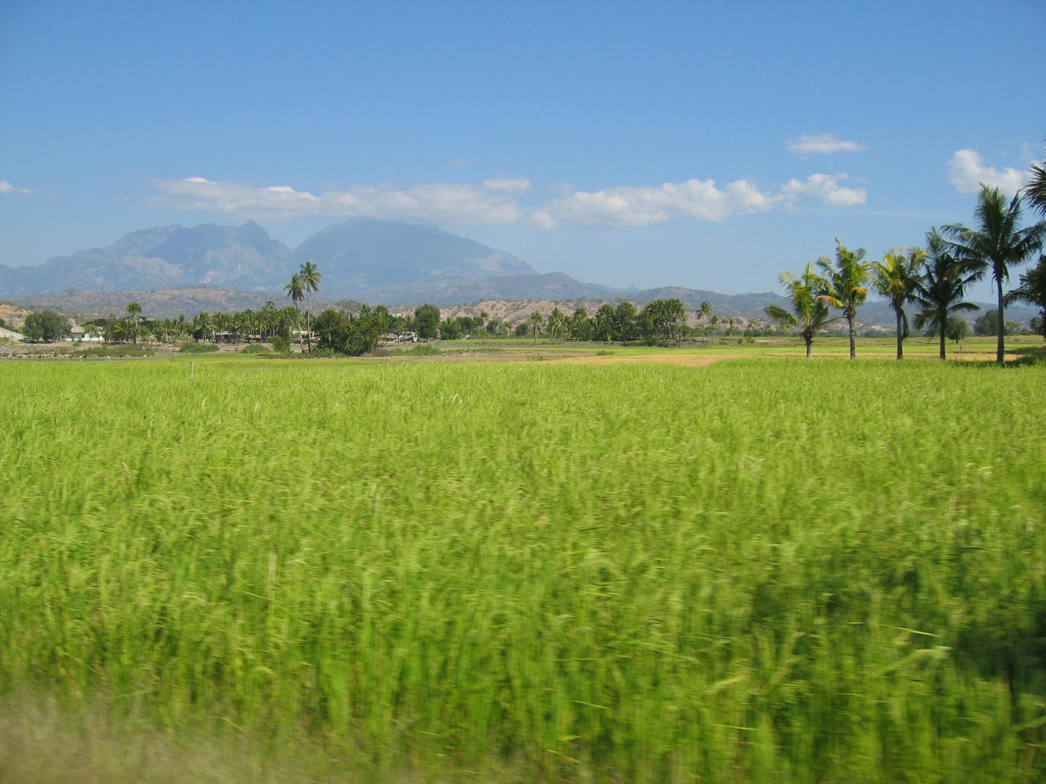 Reisfelder in Osttimor am Matebian